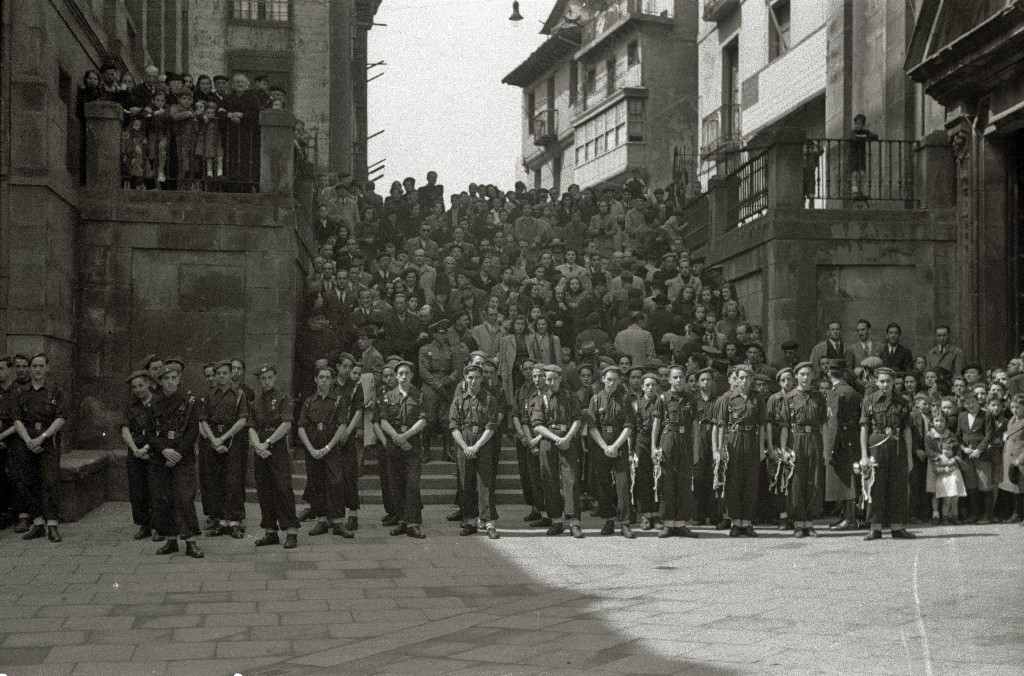 Título original: Acto en homenaje a José Antonio Primo de Rivera (5/12) Localización: San Sebastián (Guipúzcoa)